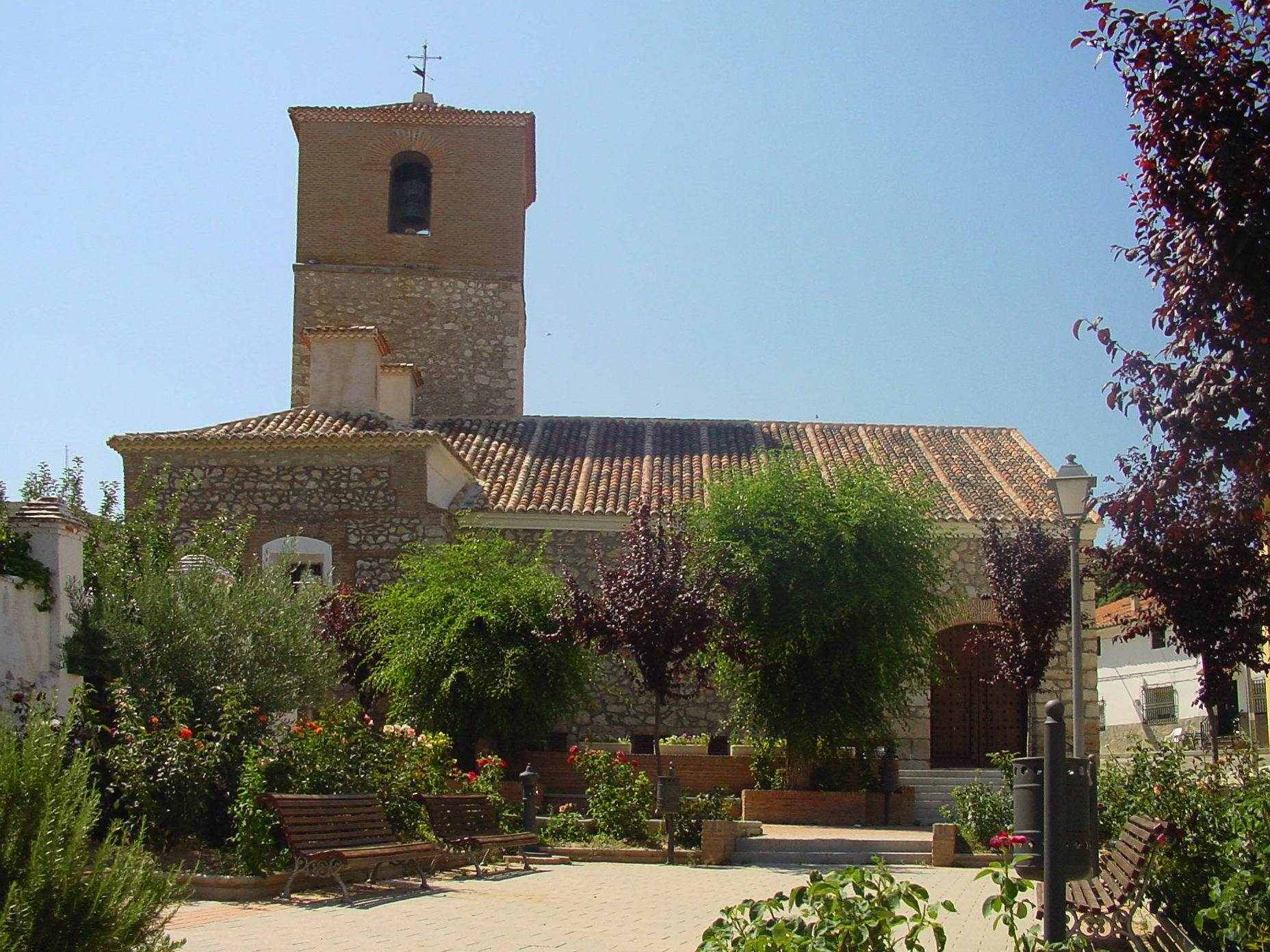 Iglesia en Anchuelo.